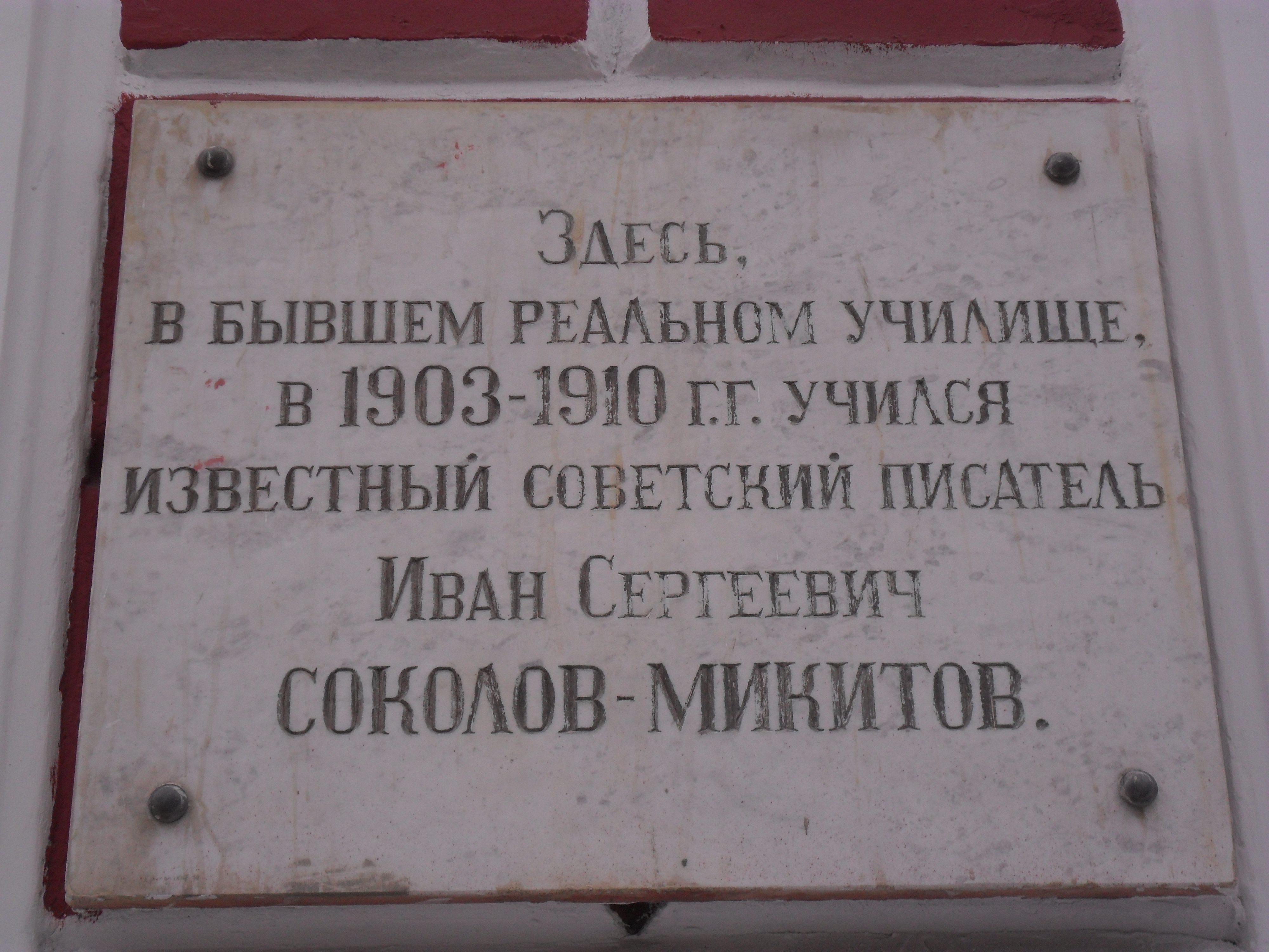 Мемориальная доска писателю Ивану Соколову-Микитову на улице Коммунистической в Смоленске.